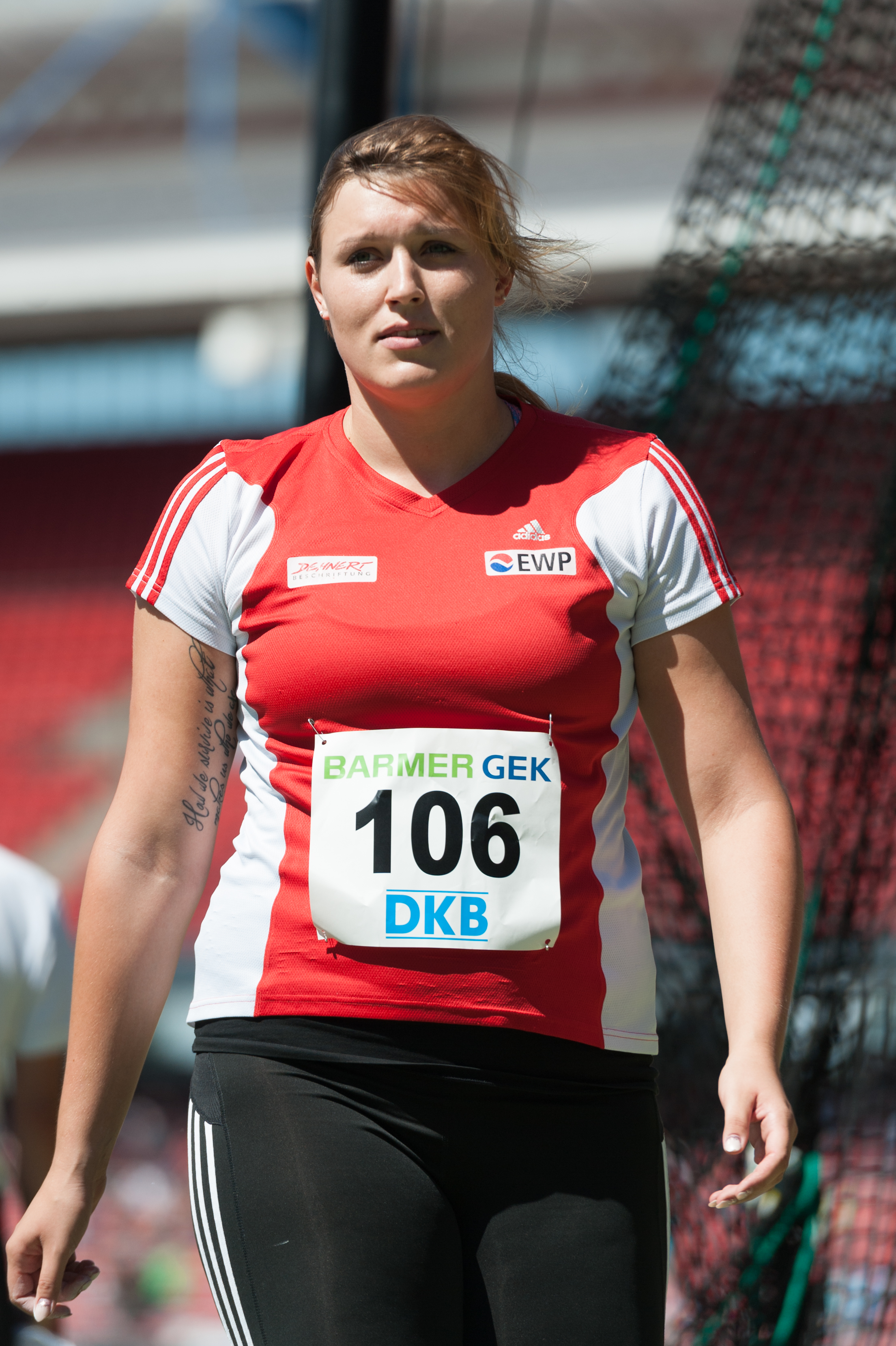 Deutsche Leichtathletik-Meisterschaften 2015: Frauen Diskuswurf - Kristin Pudenz, SC Potsdam